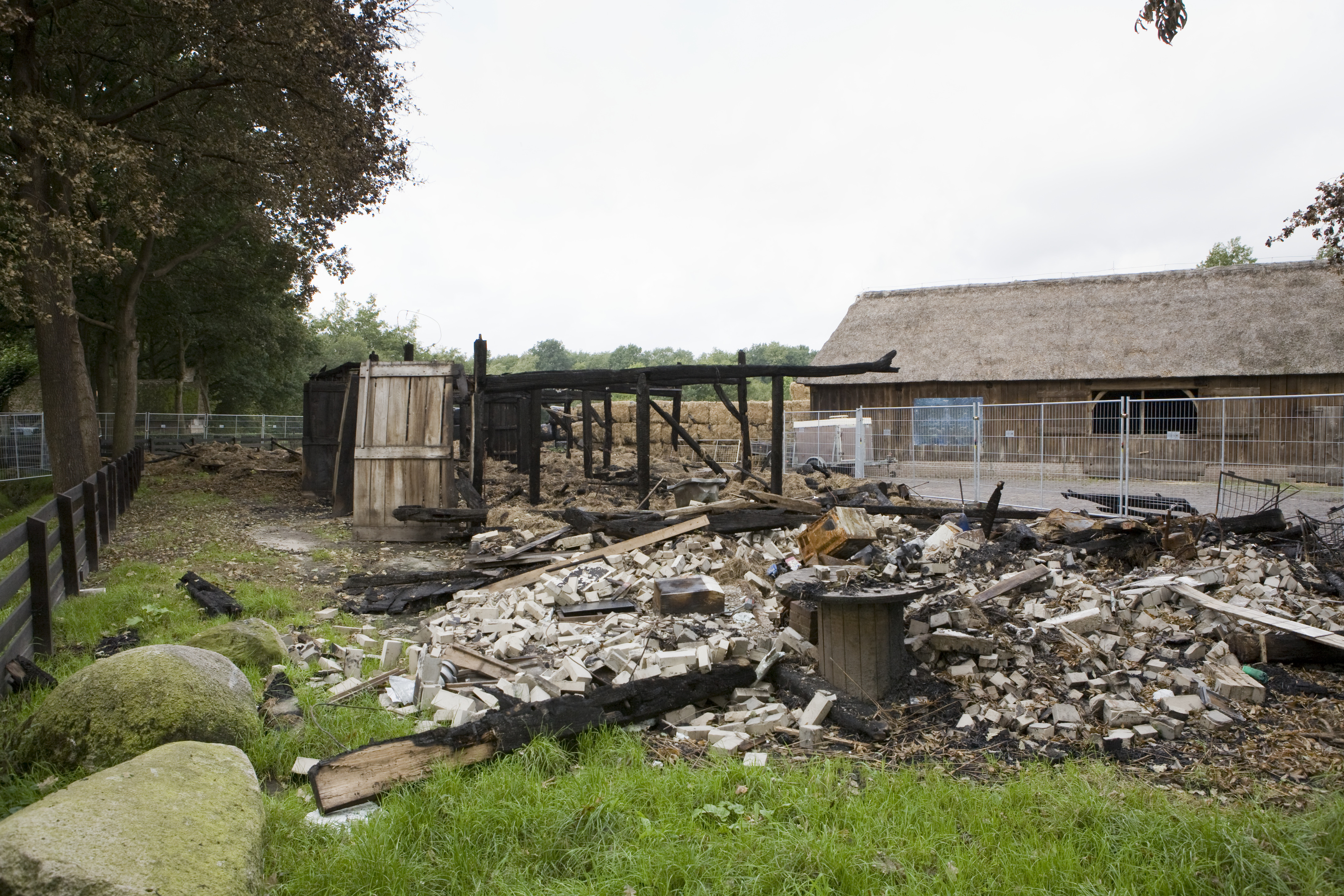 Hooischuur met schaapskooi: Overzicht van de verbrande hooischuur met op de achtergrond de schaapskooi